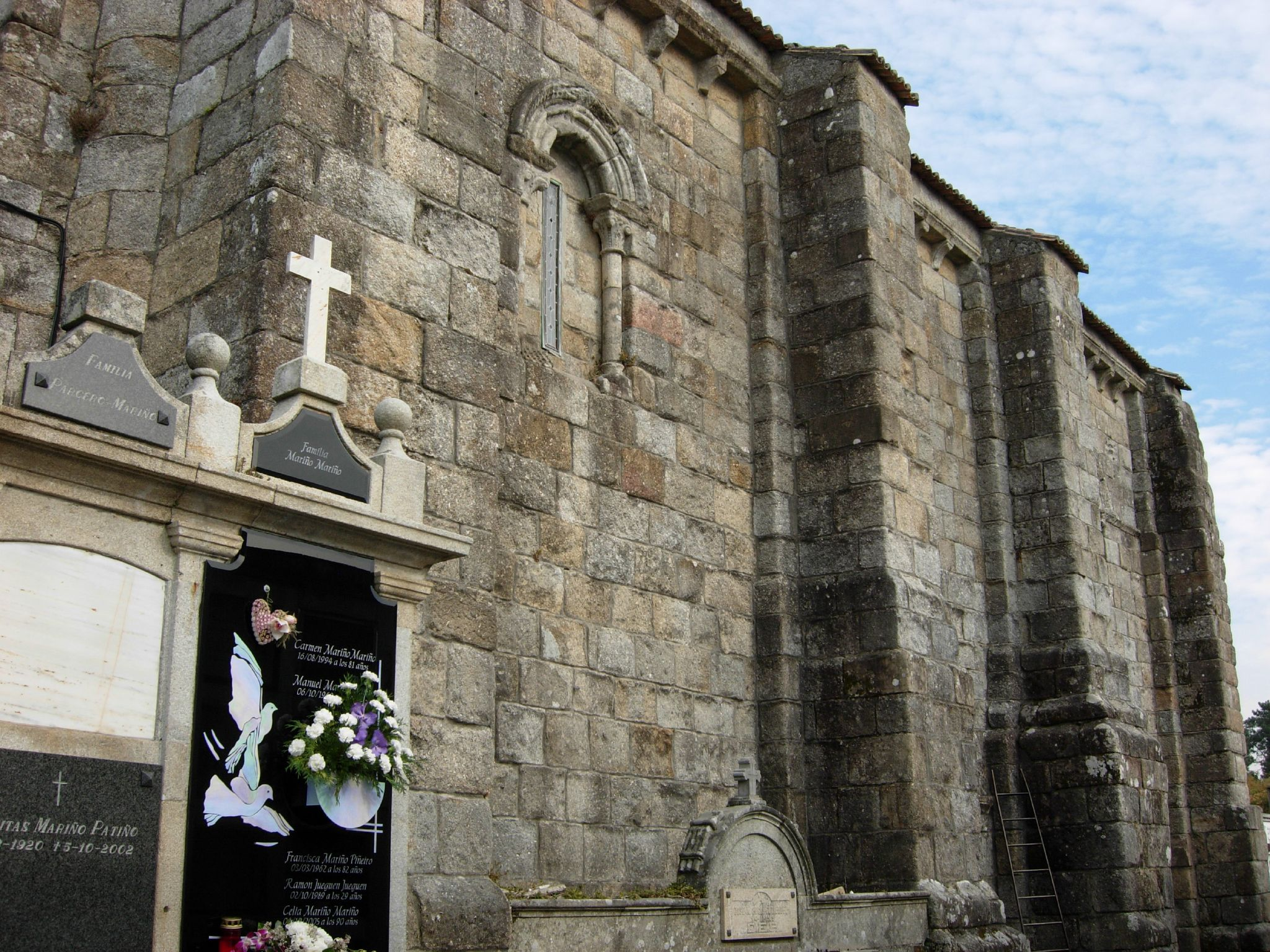 Muro sur. da Igrexa de San MArtiño de Sobrán - Vilagarcía de Arousa - Pontevedra